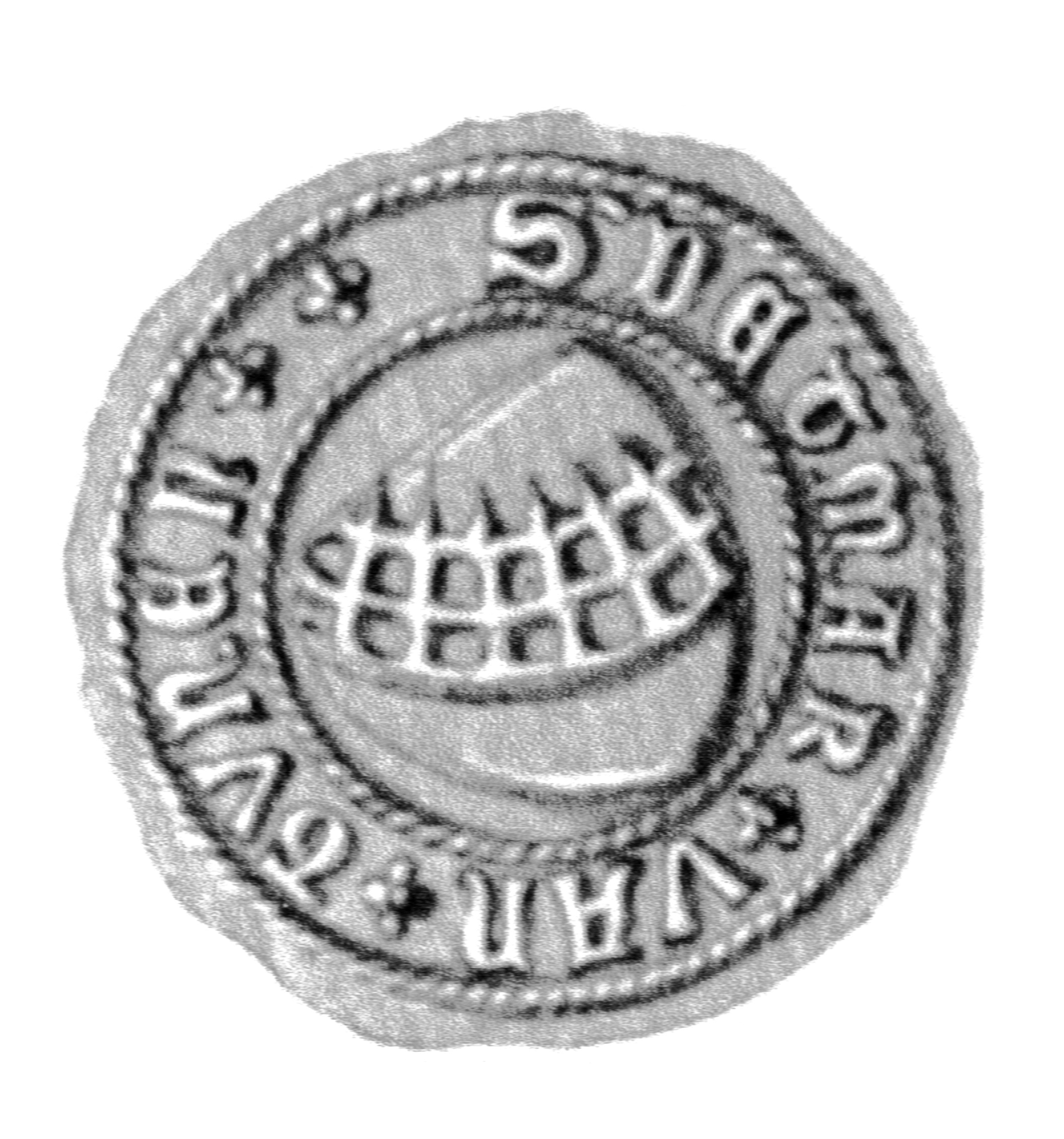 Siegel des Ratsmannes Detmar van Tunen. Das Siegel stammt aus der Zeit um 1424 Siehe Emil Ferdinand Fehling: Lübeckische Ratslinie, Nr. 465 (Ditmar von Thünen, Bergenfahrer).